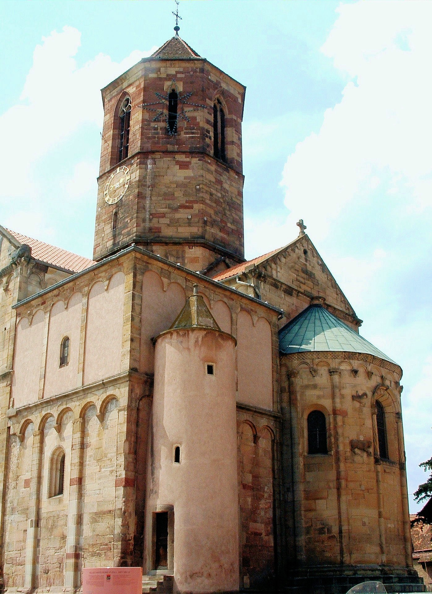 Rosheim - Eglise Saint-Pierre-et-Saint-Paul - Chevet